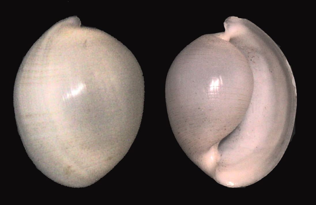 Atys naucum